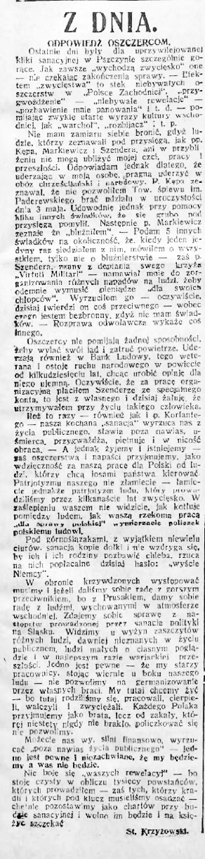 Stanisław Krzyżowski, Odpowiedź oszczercom, „Polonia” z 27 września 1927, nr 265, s. 5